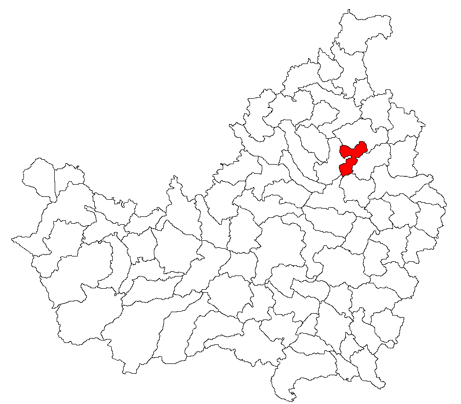 Categorie:Hărţi ale judeţului Cluj